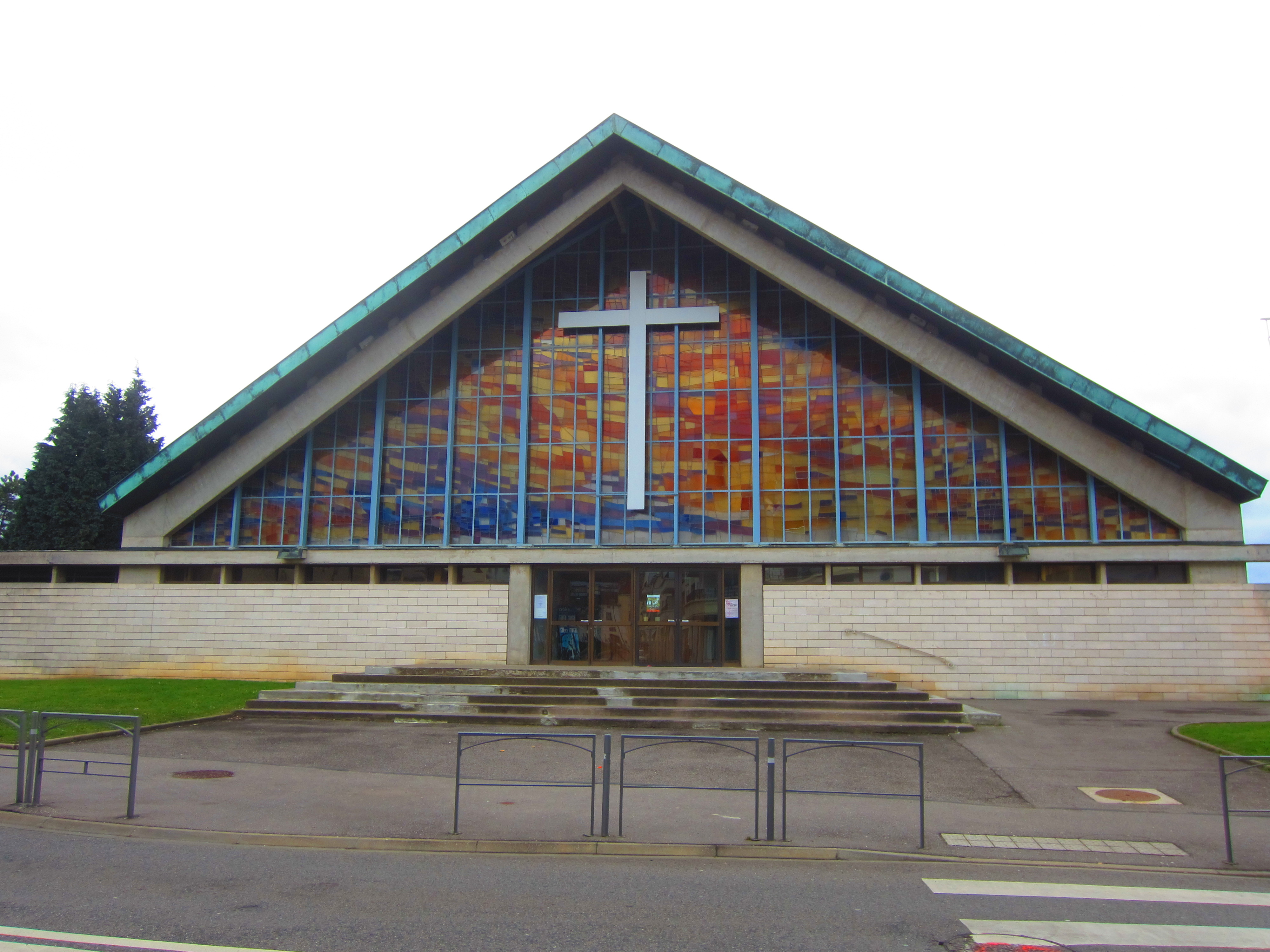 Essey Nancy eglise st pie